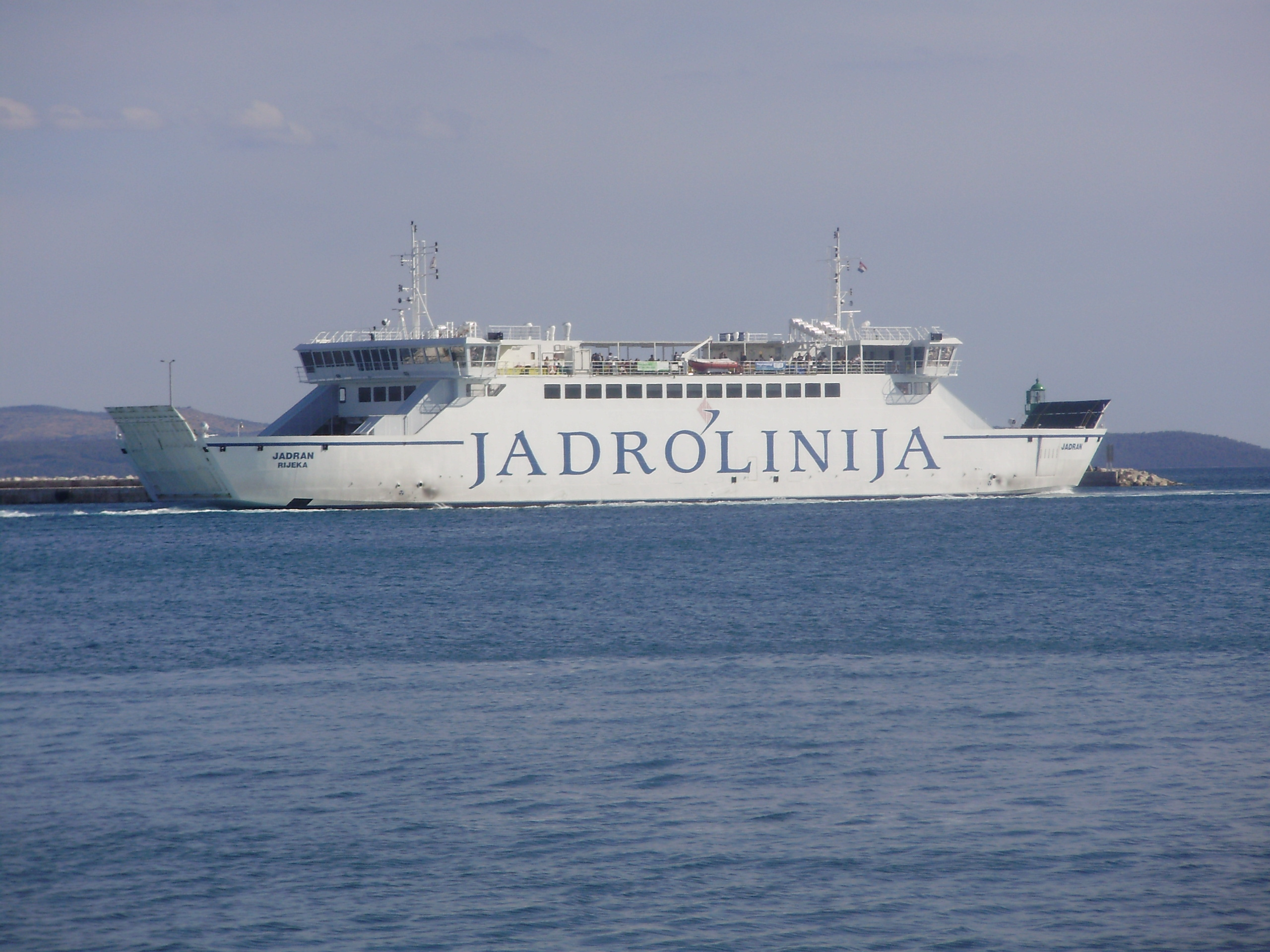 Jadran